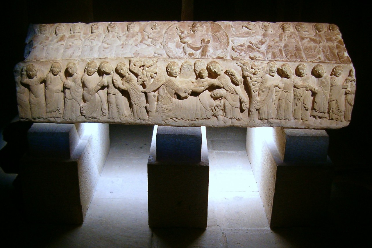 Esta foto participa en el juego En un lugar de Flickr... Se trata de adivinar el lugar de la fotografia. No contestes si no estás registrado en el juego!!!!. Si deseas contestar, únete primero! muchas gracias Panteón de los Infantes Sepultura Doña Blanca Garcés, conocida como Blanca de Navarra. El sepulcro de Blanca de Navarra, del que solo se conserva la tapa, es el único original del conjunto. Data del siglo XII y es una pieza de talla románica. Esta adornado con bajorrelieves que representan escenas del evangelio y de la vida de Blanca, que murió muy joven. El detalle del Pantocrátor es relevante a ser el único caso que se conoce de su representación en una tumba.